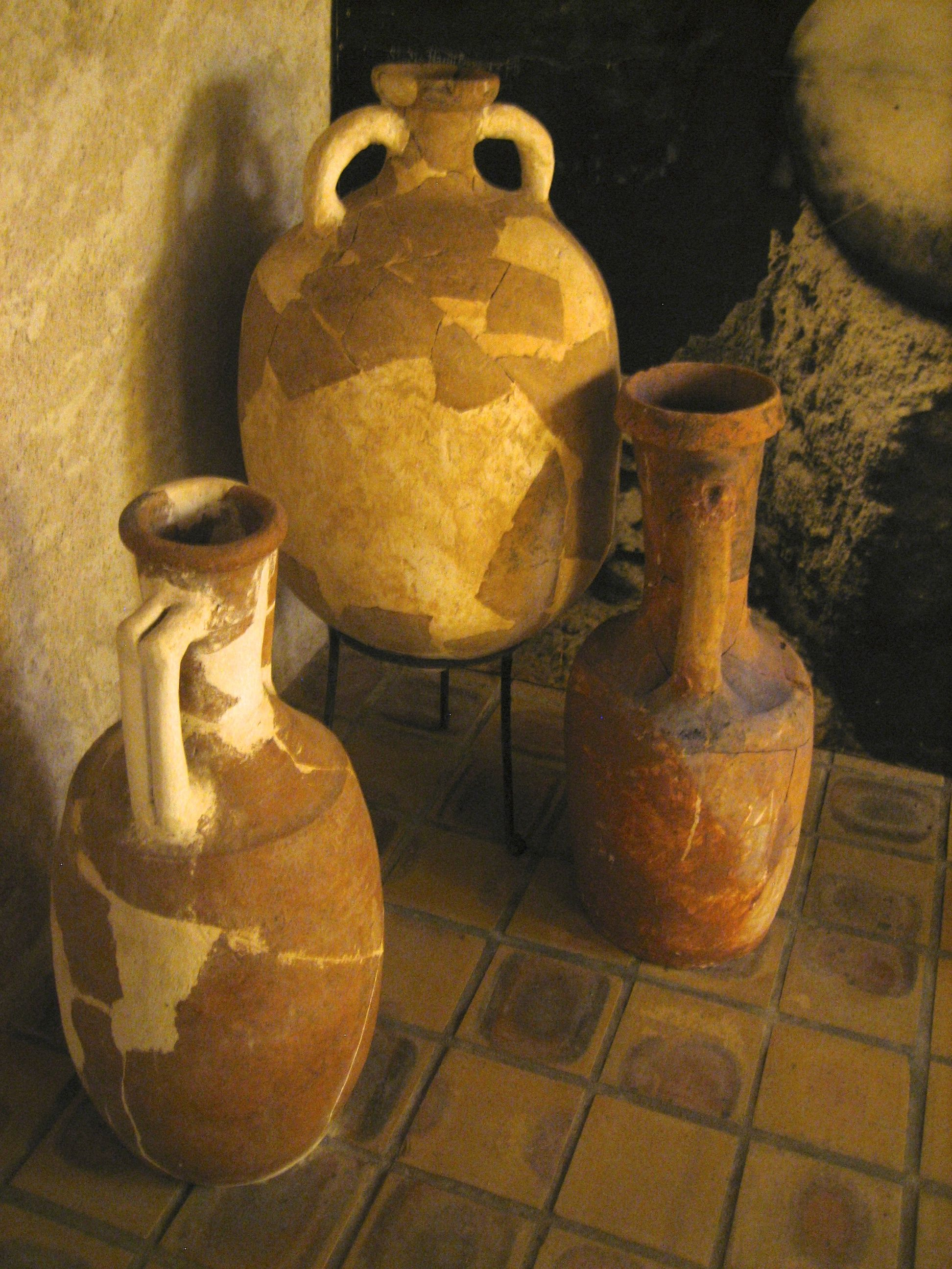 Cave des amphores